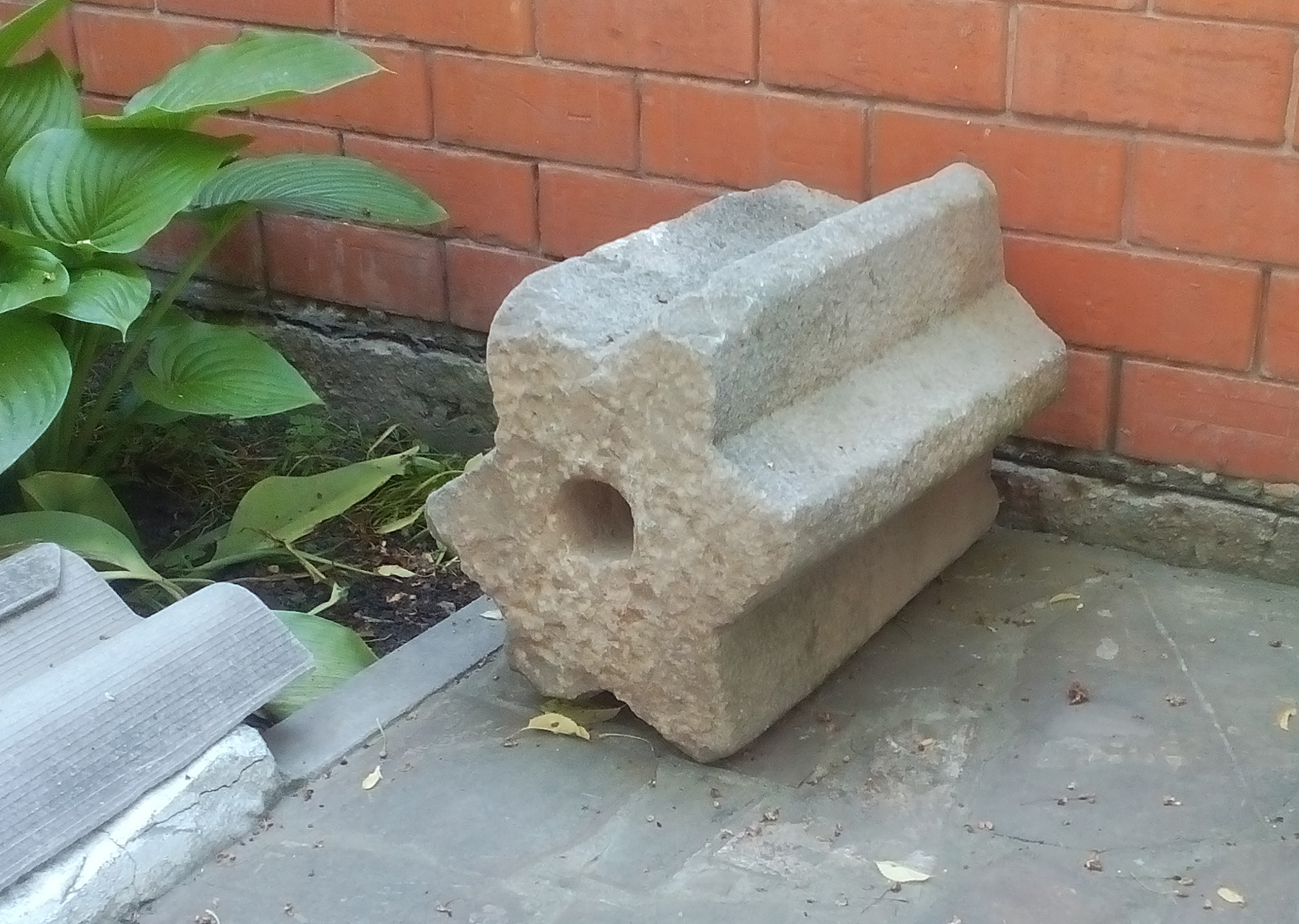 Гарман в частном доме Каменска-Шахтинского